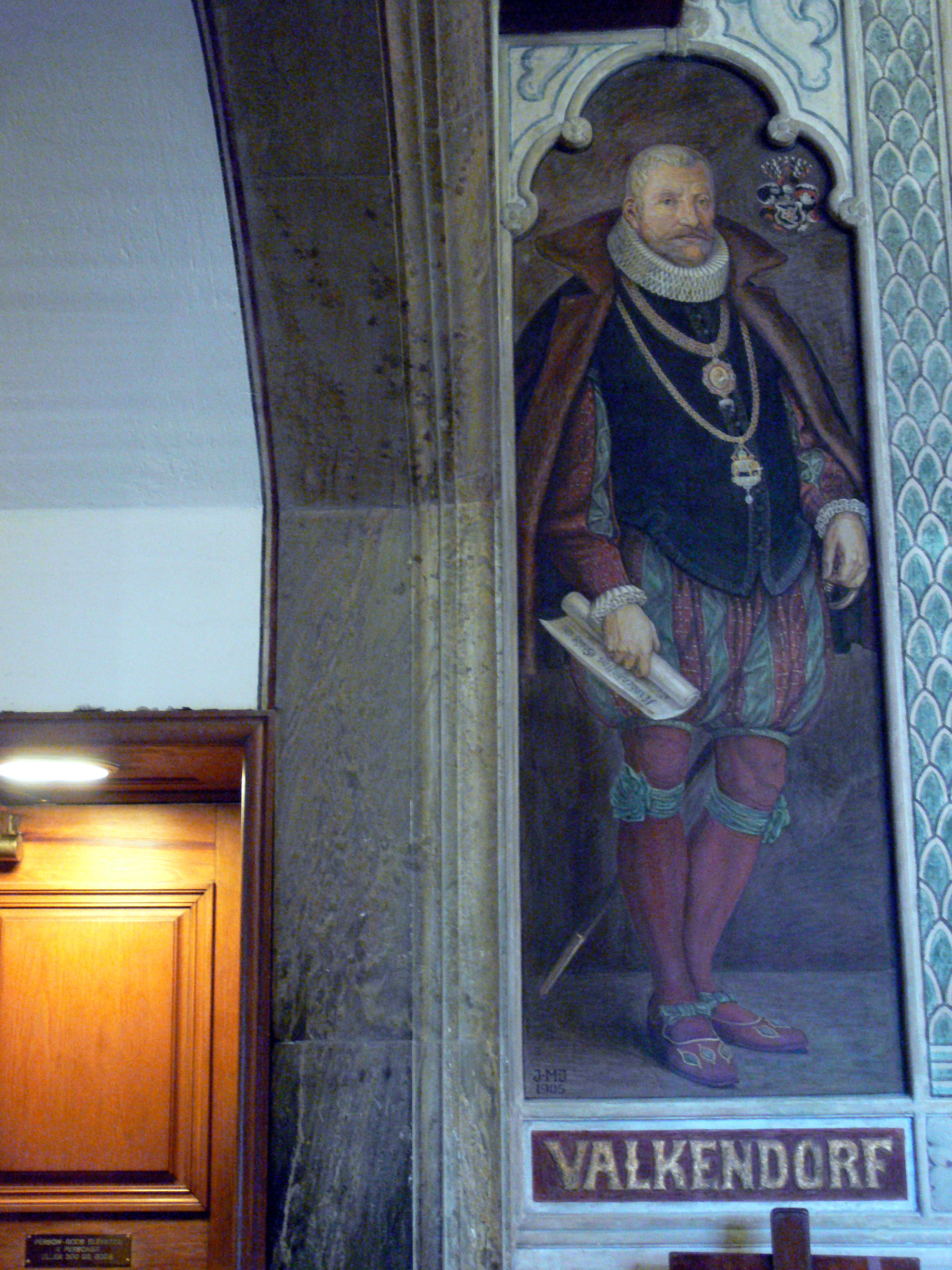 Christoffer Valkendorf (1525-1601), Rentmeister unter König Friedrich II. Wandbild im Rathaus zu Kopenhagen.